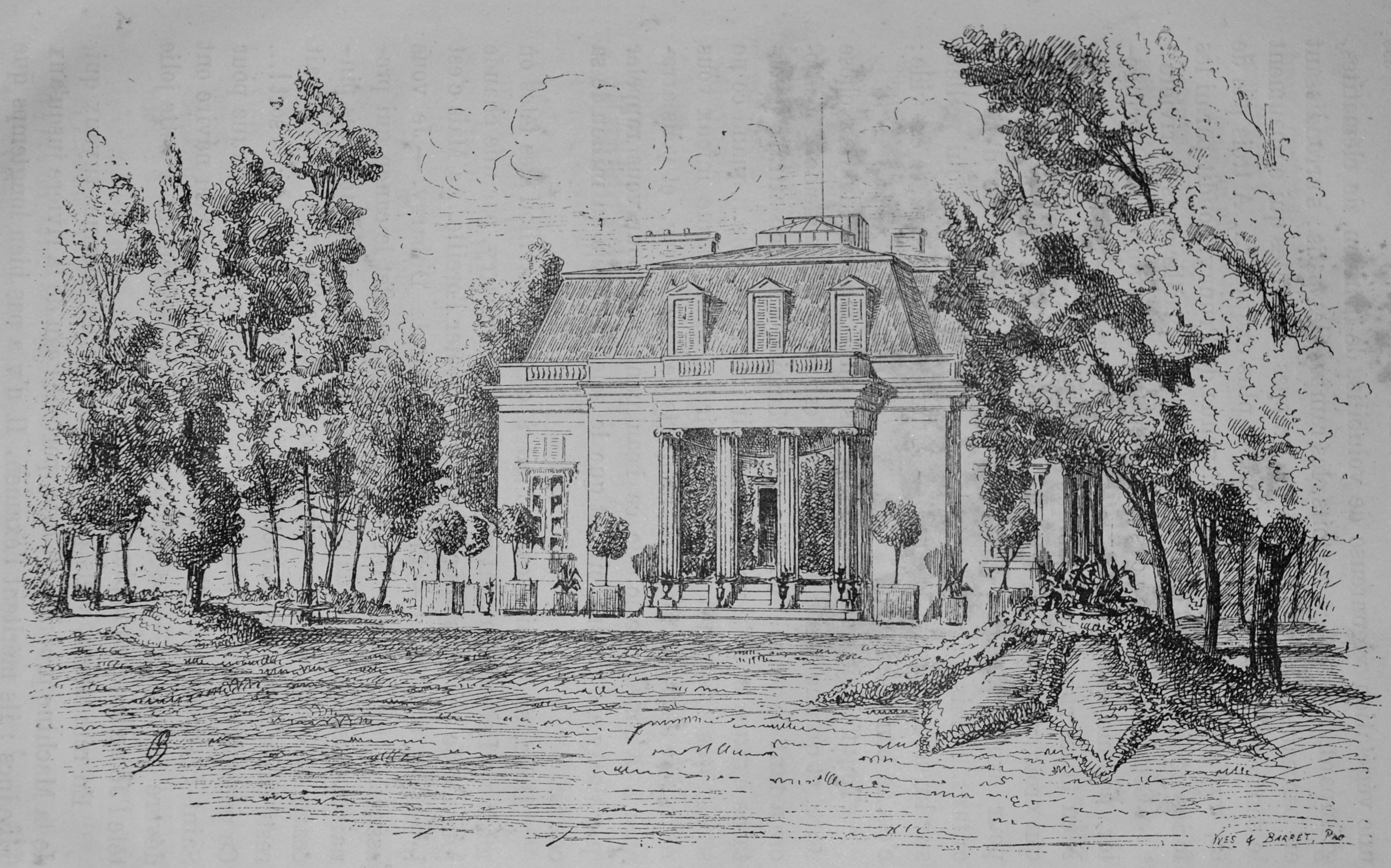 Photo d'une page de la revue Le Tour de France, première année, 1880